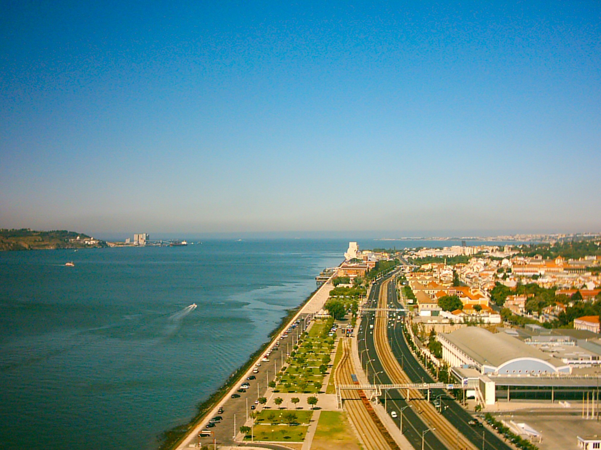 Vista do Estuário do Tejo, Lisboa, Portugal